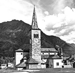 Pieve Vergonte (Verbania) - Church of SS. Vincent and Anastasius